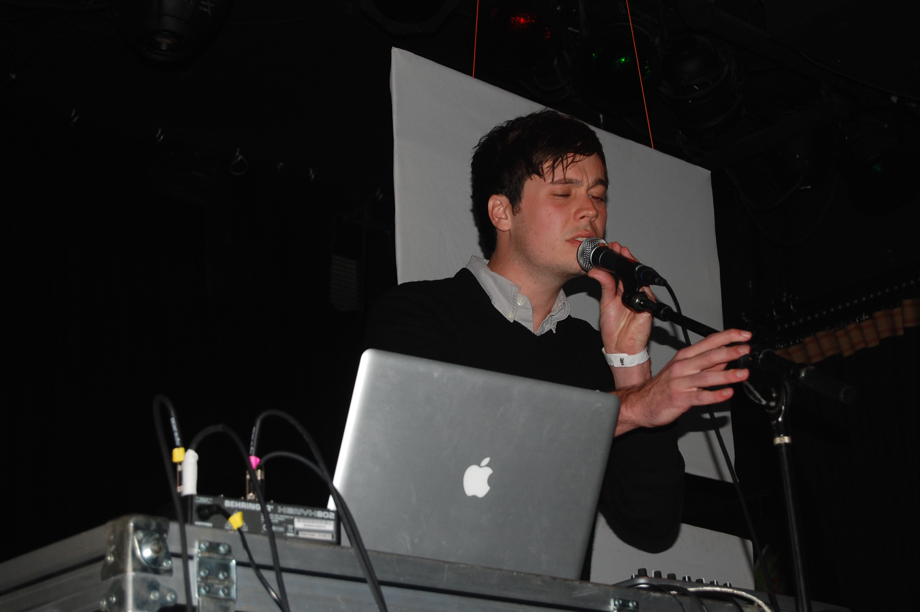 Washed Out en video de Santos Party House en New York City en 2009